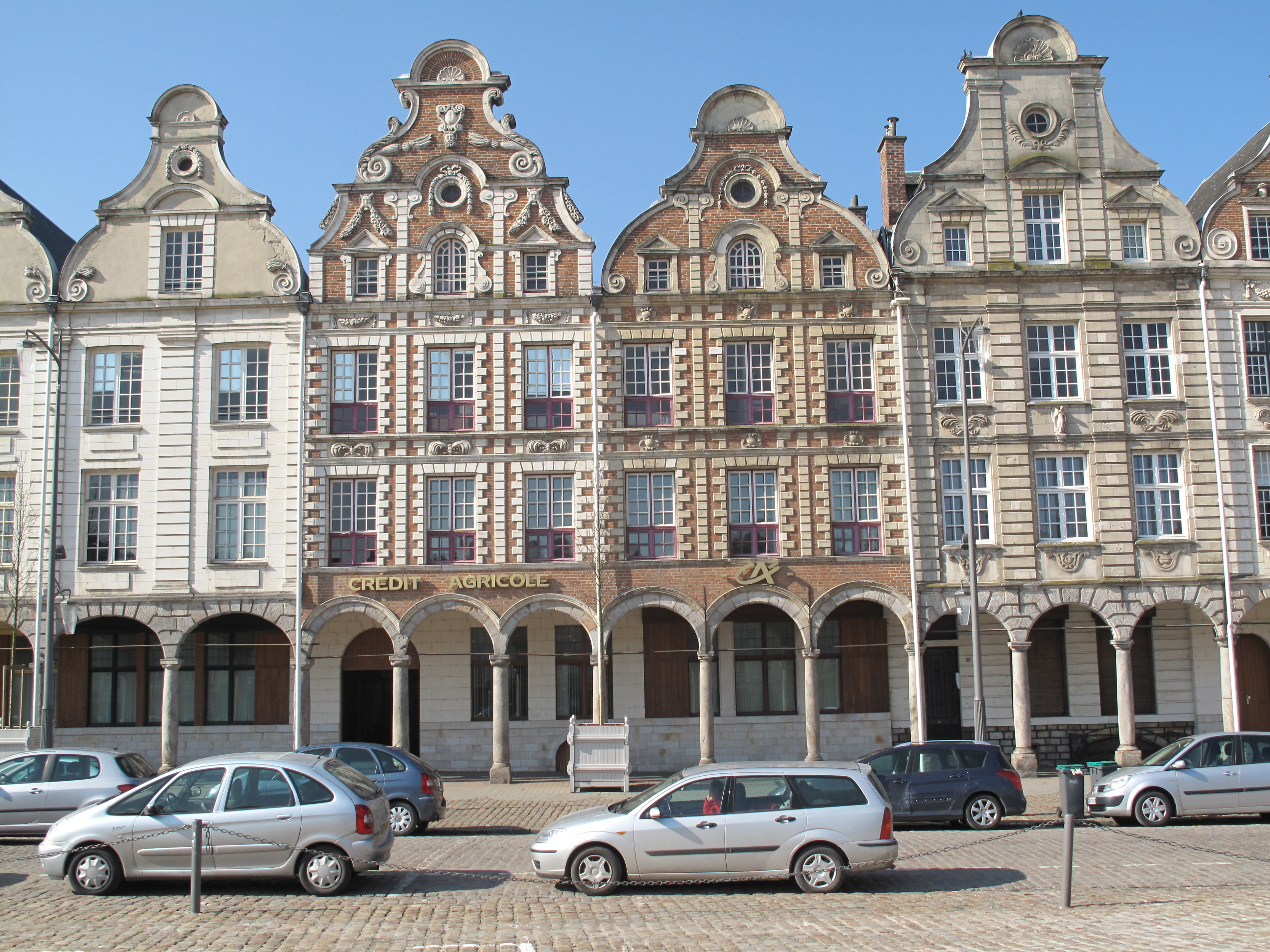 27 Grand place - Ville d'Arras .